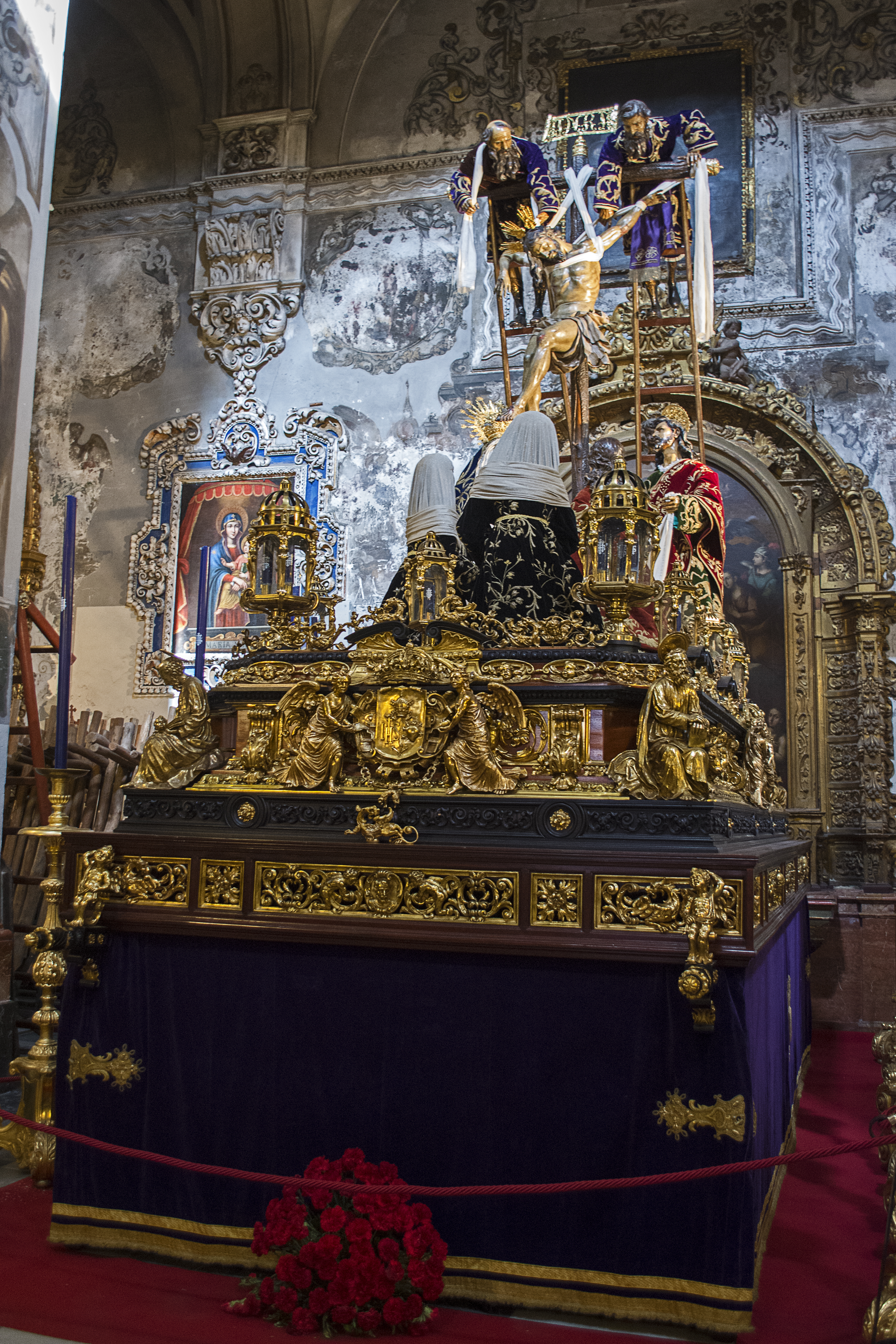 Paso de la Quinta Angustia. Iglesia de la Magdalena. Sevilla